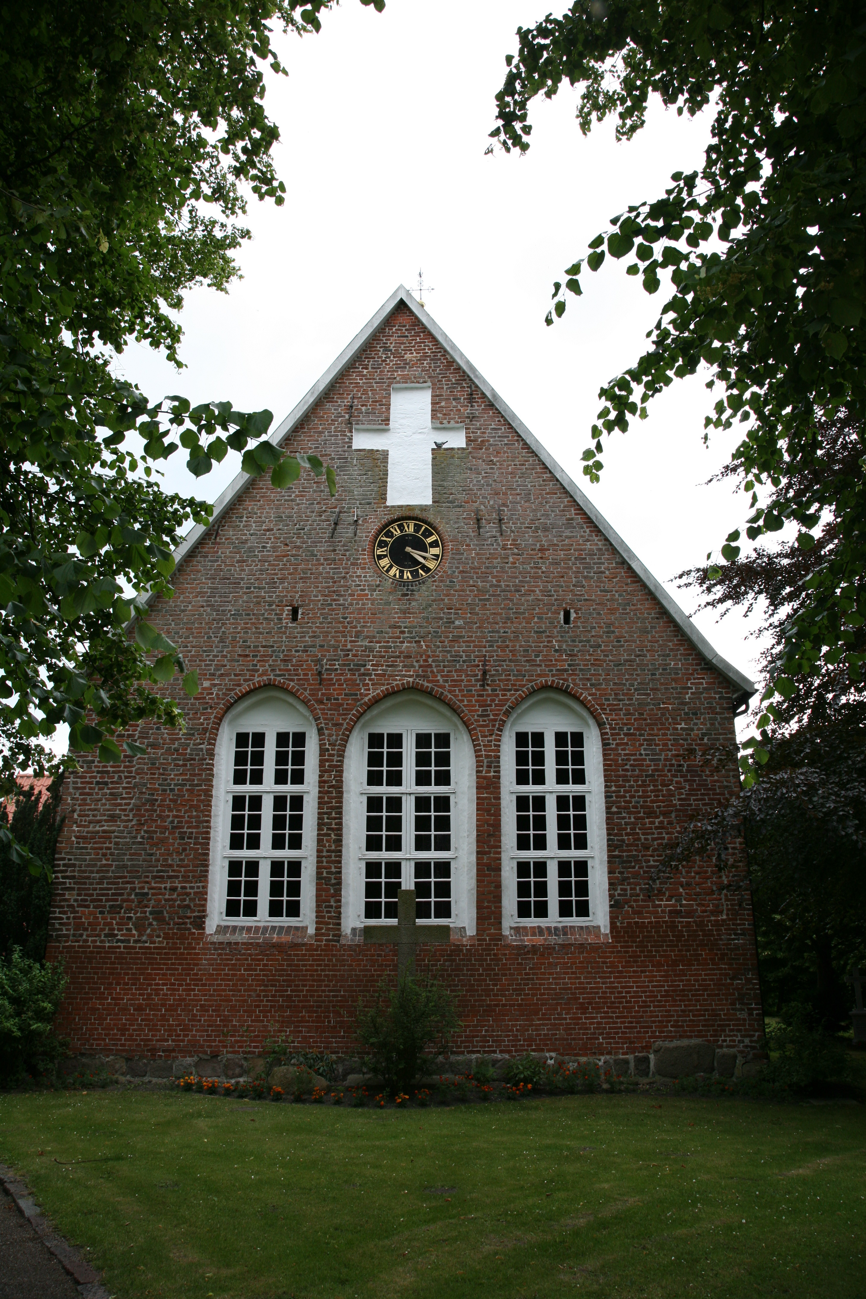 St.JürgenKirche is a church in Grube, Schleswig-Holstein